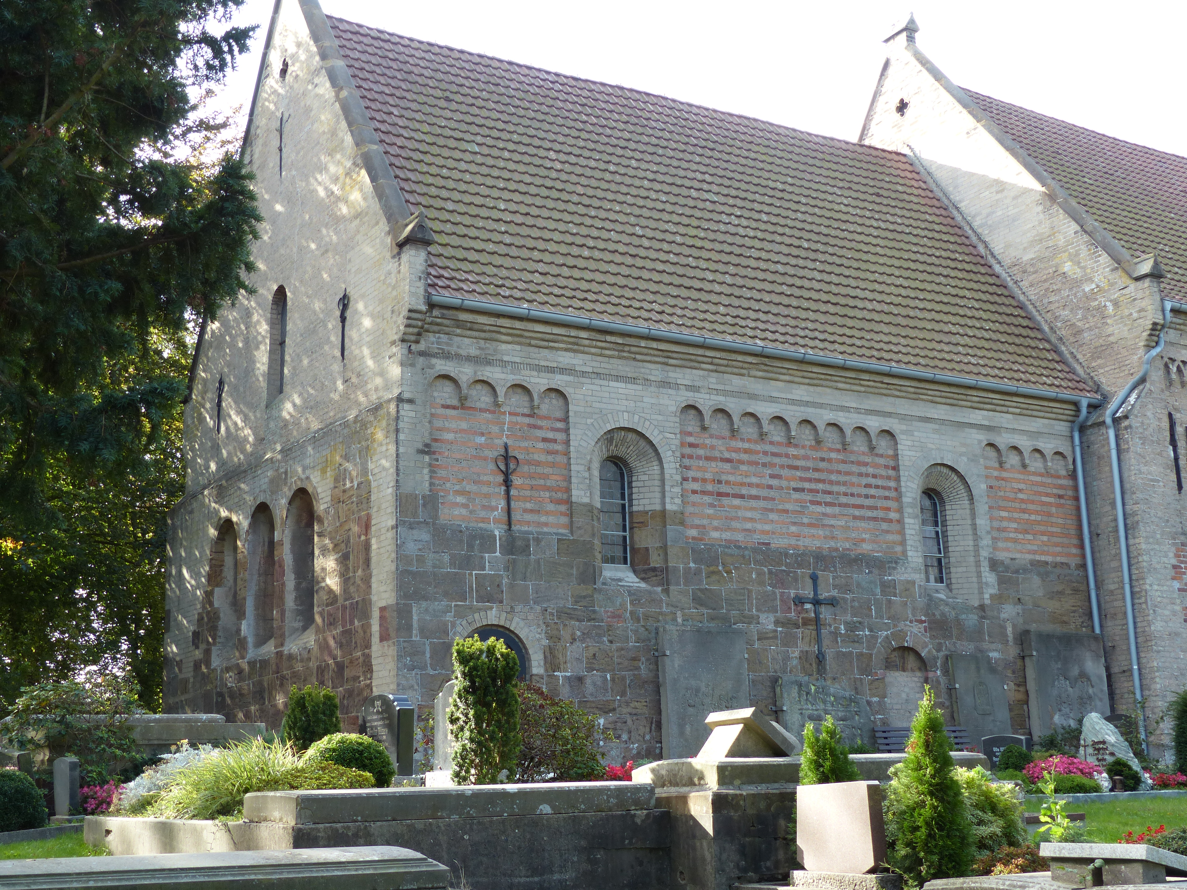 Kirche in Blexen, Nord- und Ostseite des Chors